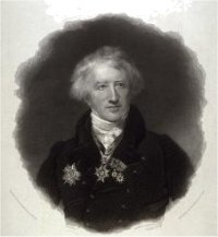 Georges Cuvier.